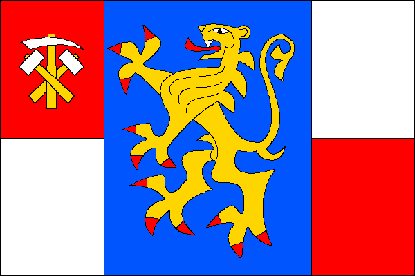 vlajka, Oskava, okres Šumperk